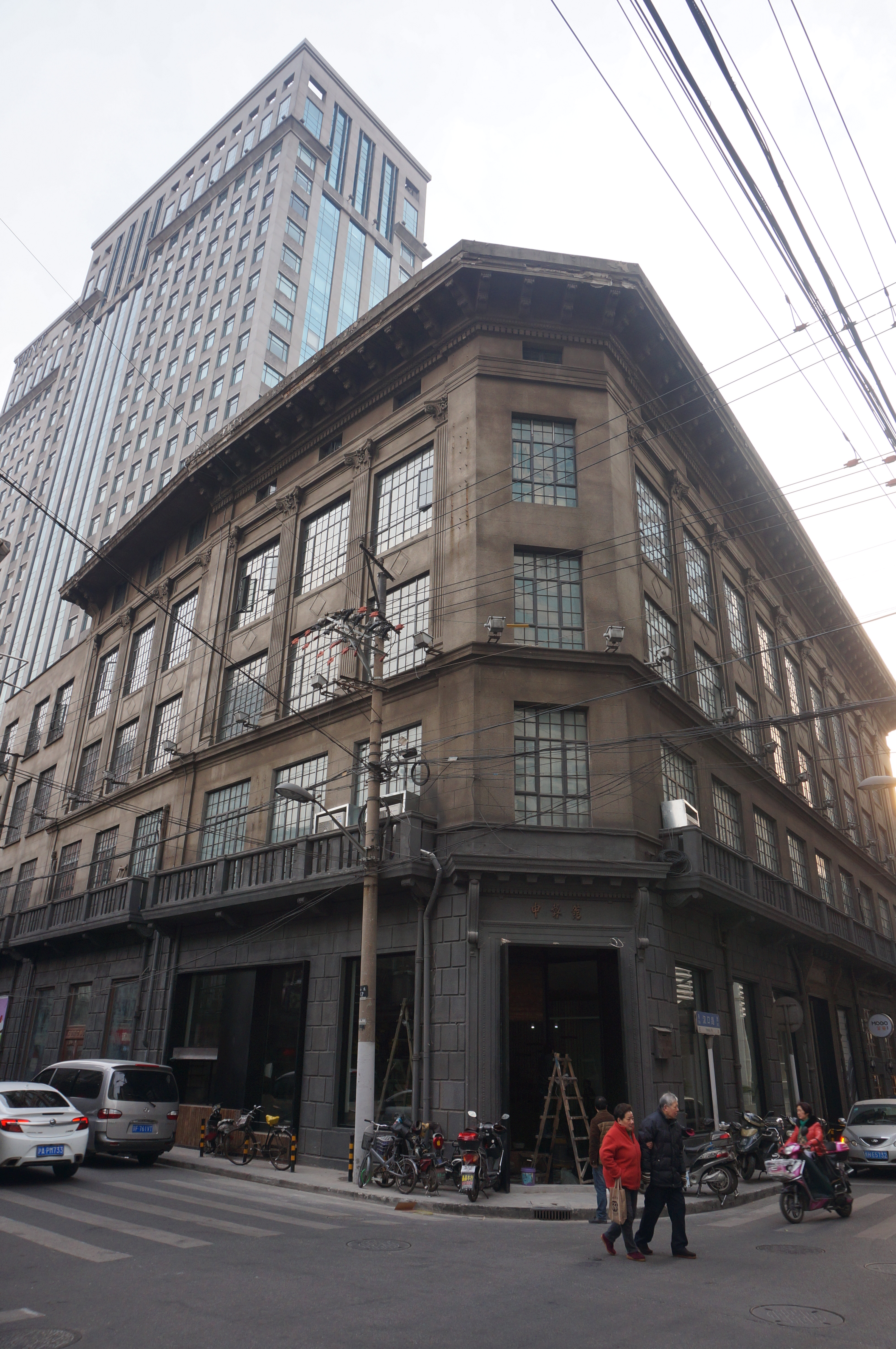 中文（中国大陆）: 上海申报馆